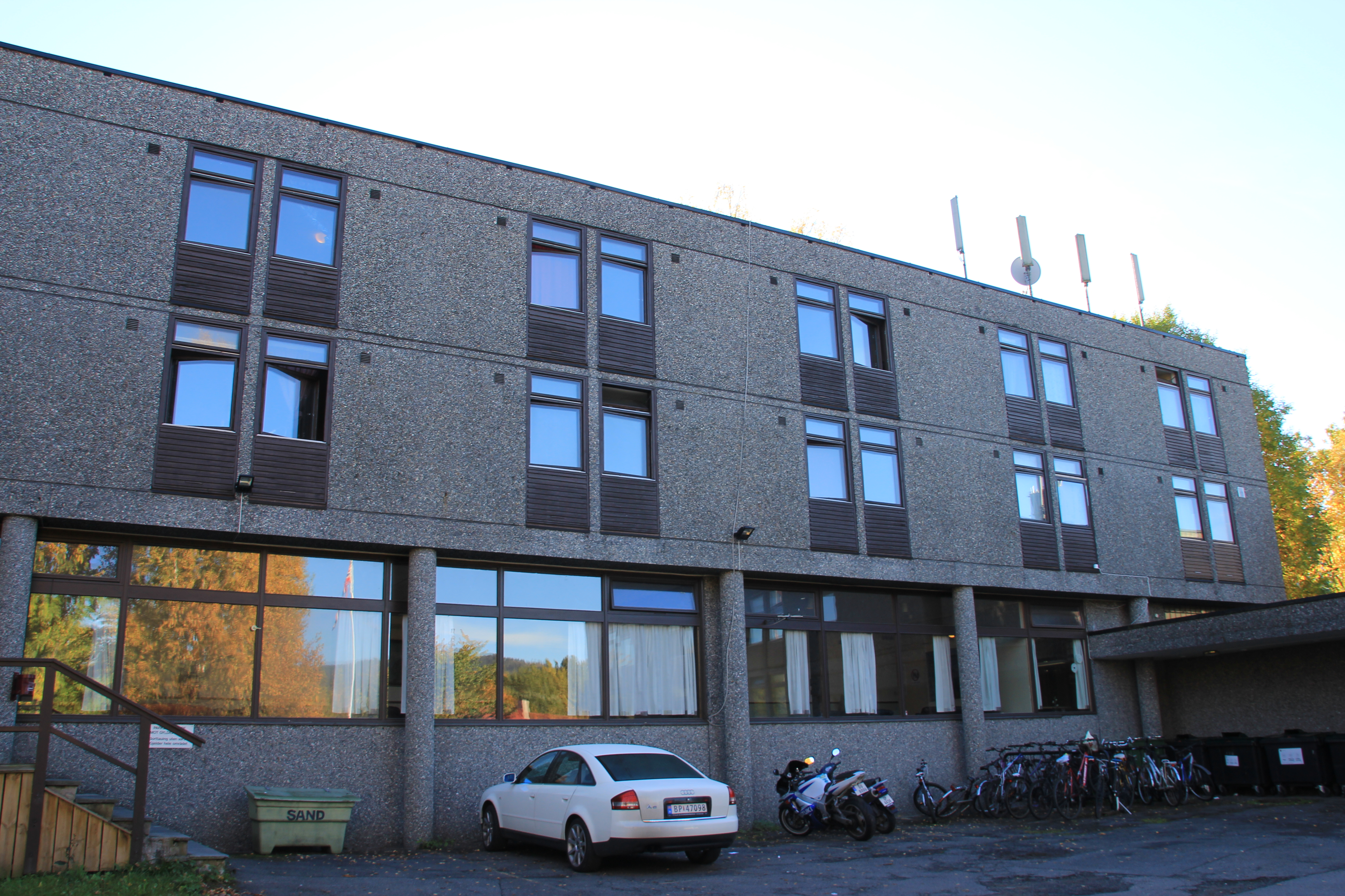 Nordnorsk Student- og Elevhjem. John Collets allé 110. Bygget er oppført i naturbetong og er tegnet av Erling Viksjø.